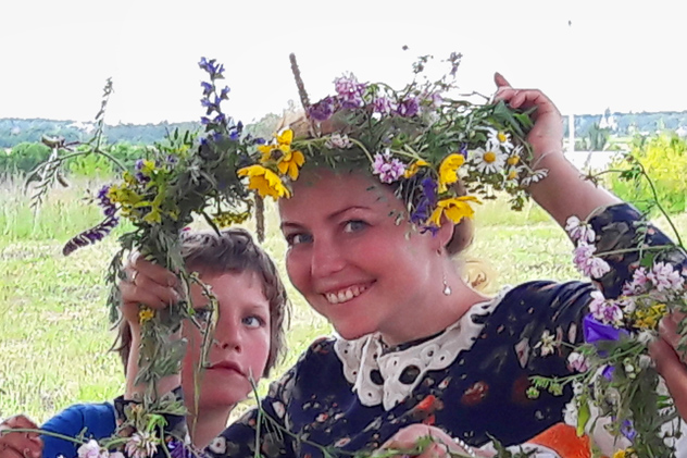 Плетение венков. Праздник Ивана Купалы в родовом поселении «Серебряный бор», Белгородская область.